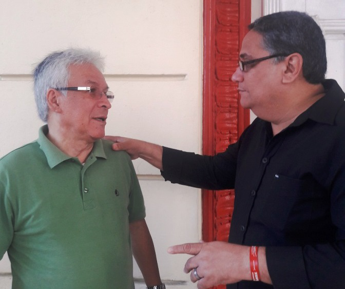 Mantilla Pinilla